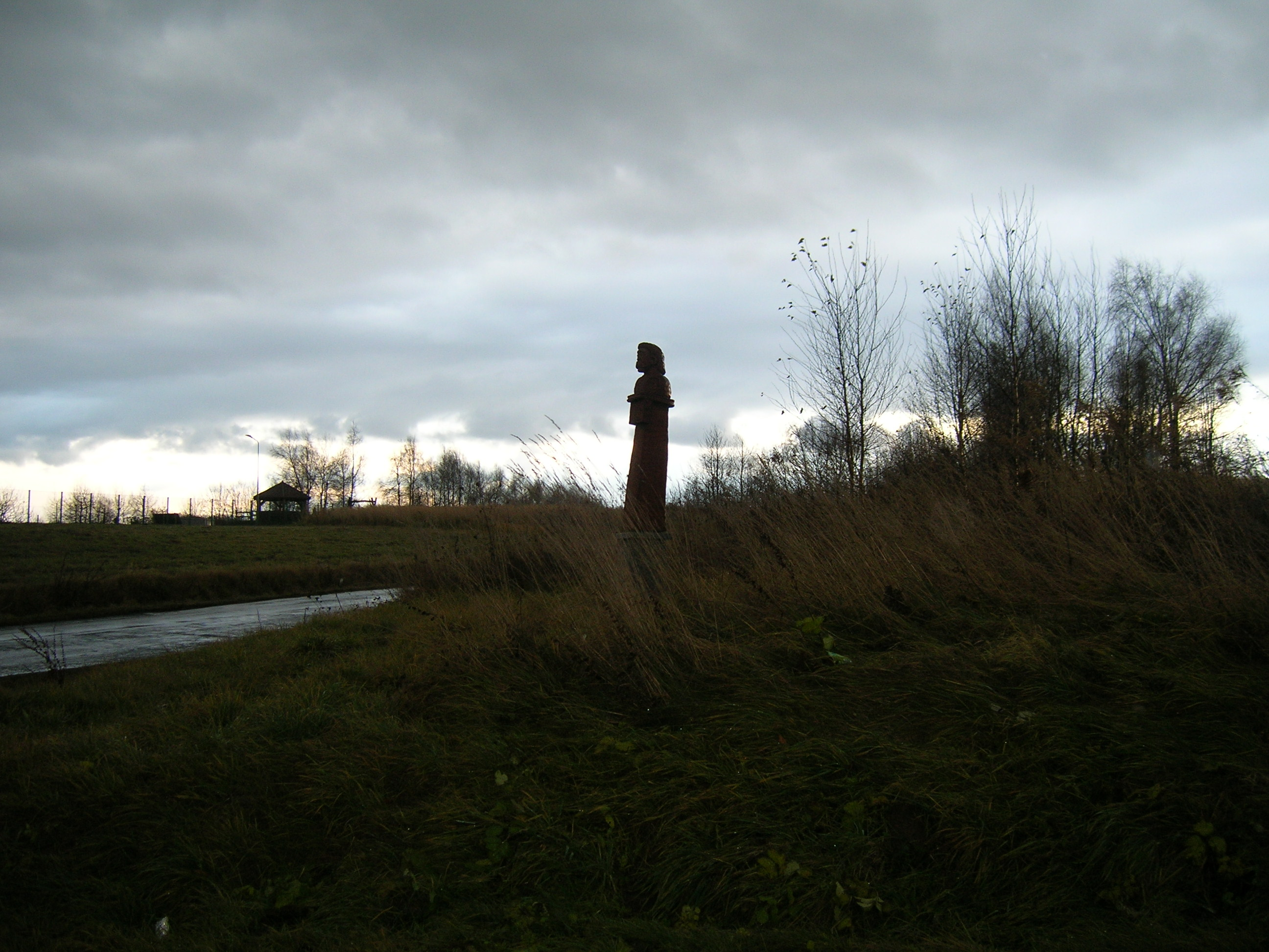 Łysa Góra.Grojec